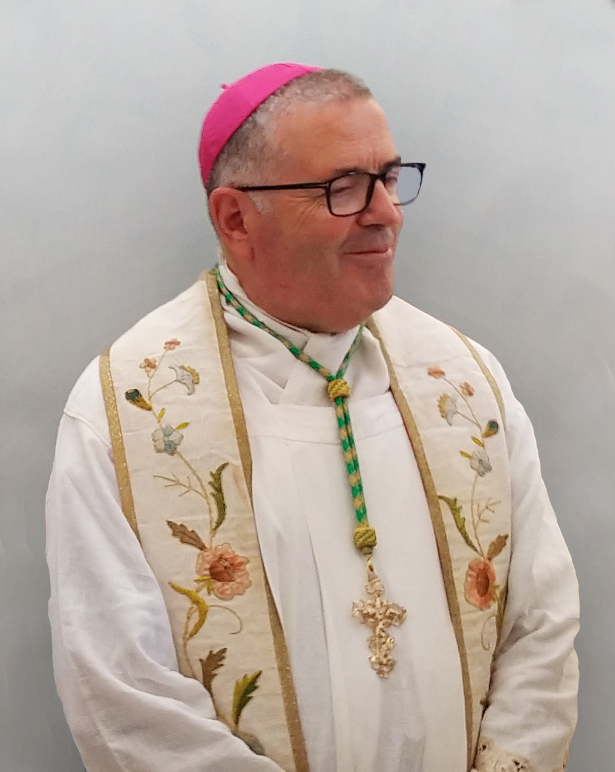 Catholic Archbishop Luigi Vari.